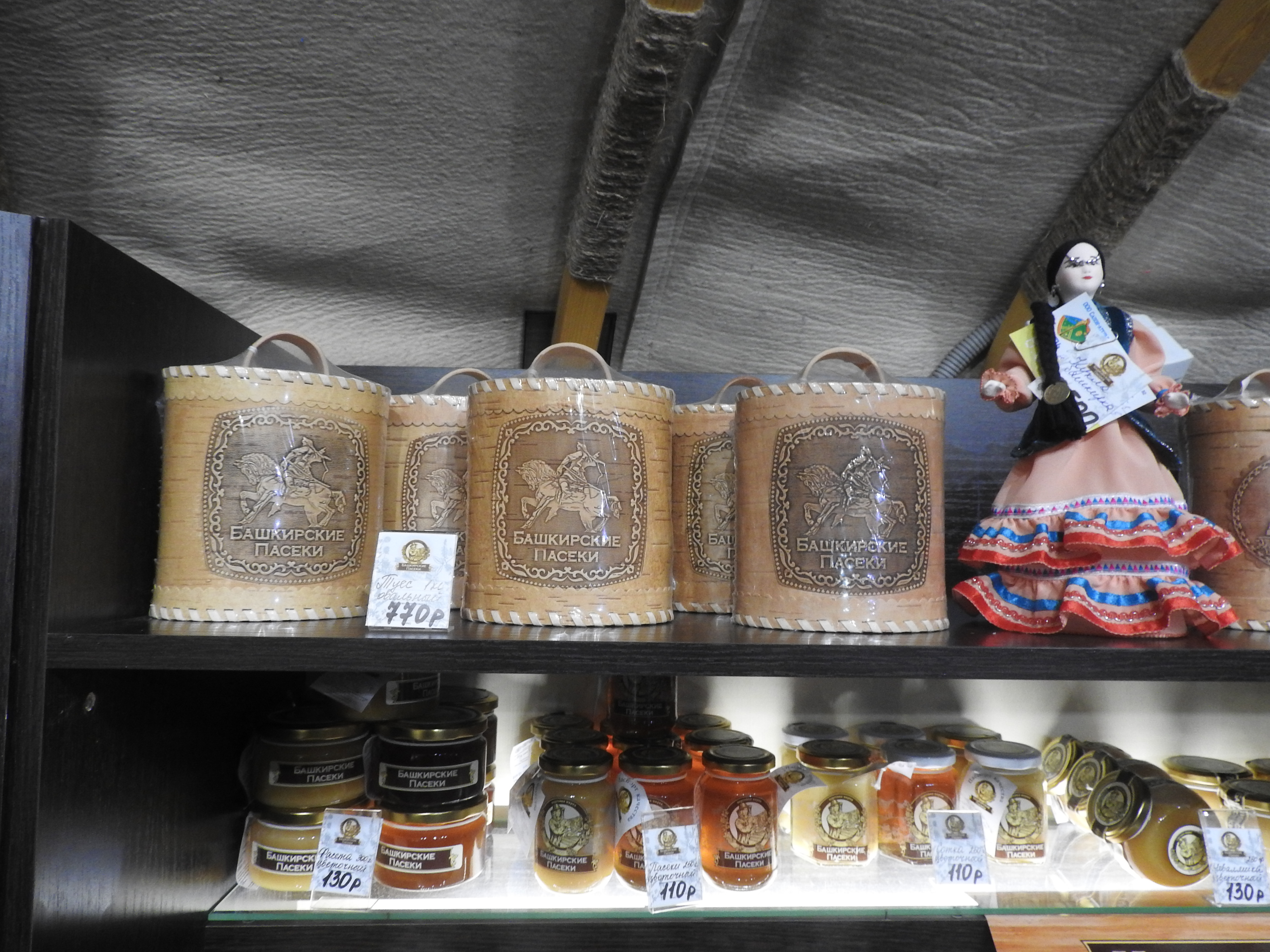 Мёд в башкирской этнодеревне